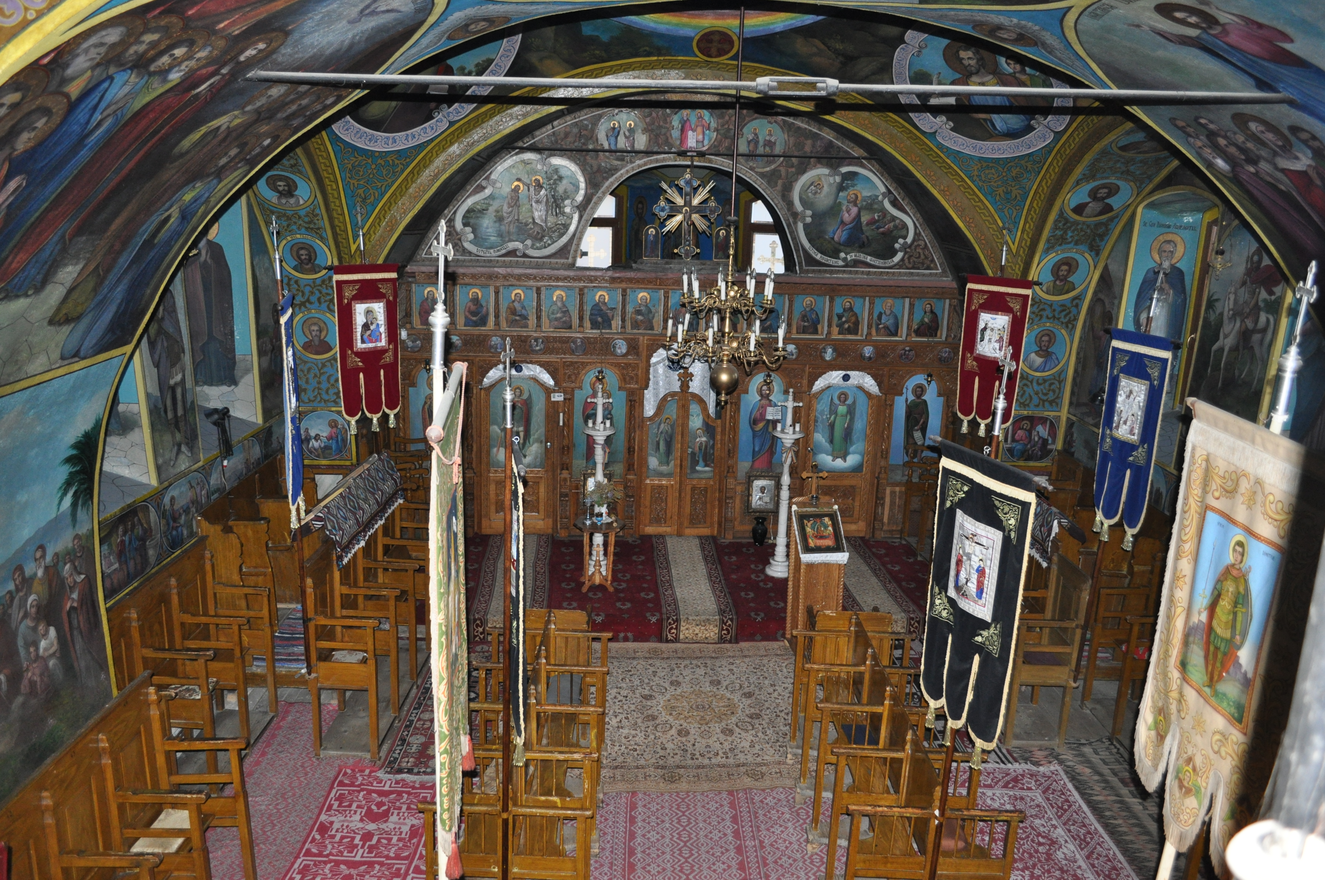 Laz (Săsciori), județul Alba